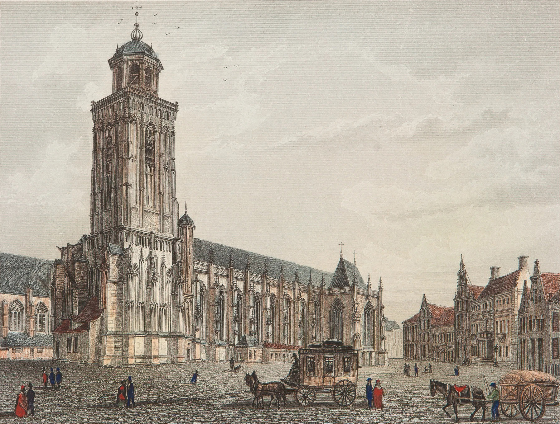 Gravure van Ludwig Rohbock, handgekleurd, verschenen in Het koningrijk der Nederlanden, voorgesteld in eene reeks van naar de natuur geteekende schilderachtige gezigten door Johannes Leonardus Terwen